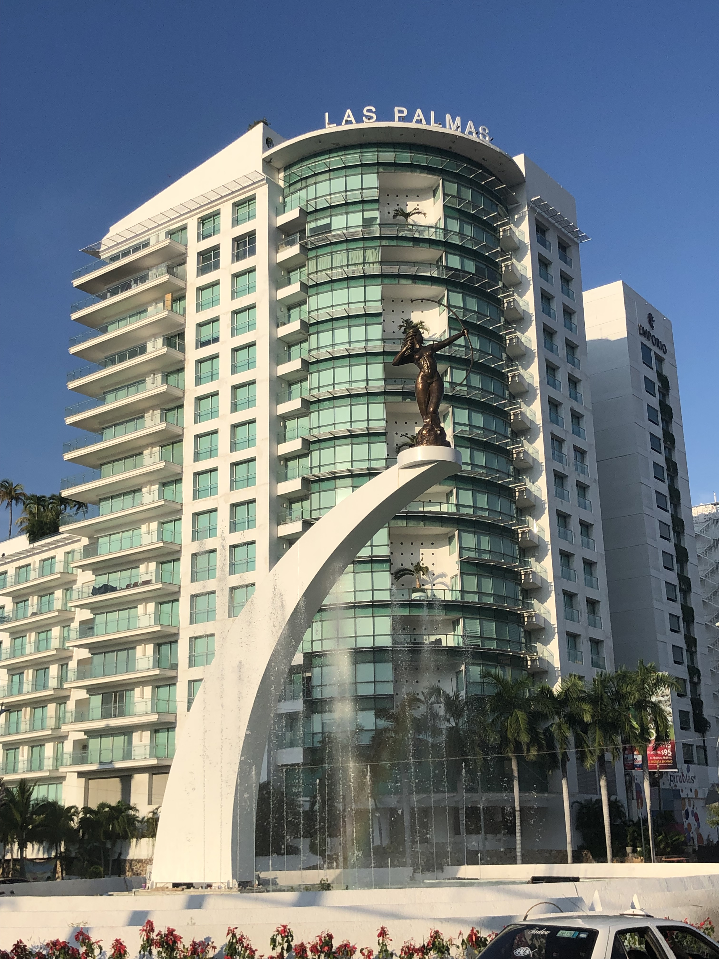 Fuente de la Diana cazadora